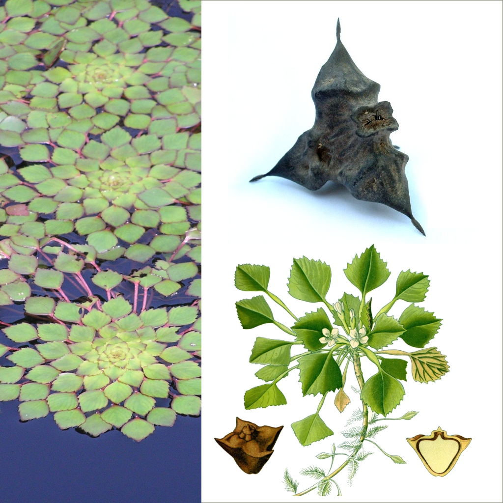 Grafika podręcznika Wikijunior:Owoce. Kasztan wodny; kotewka orzech wodny (Trapa natans).